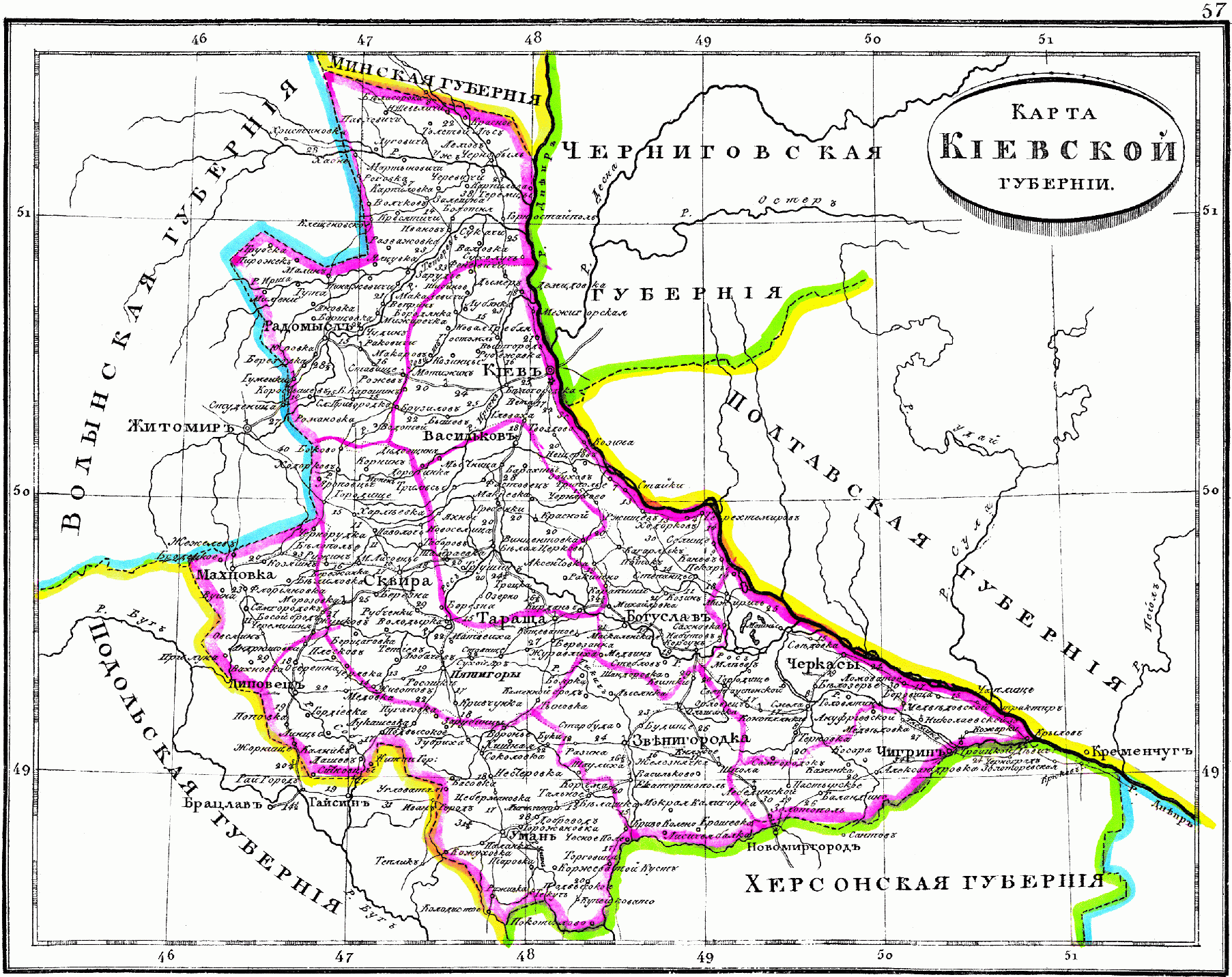 Карта Киевской губернии, 1835